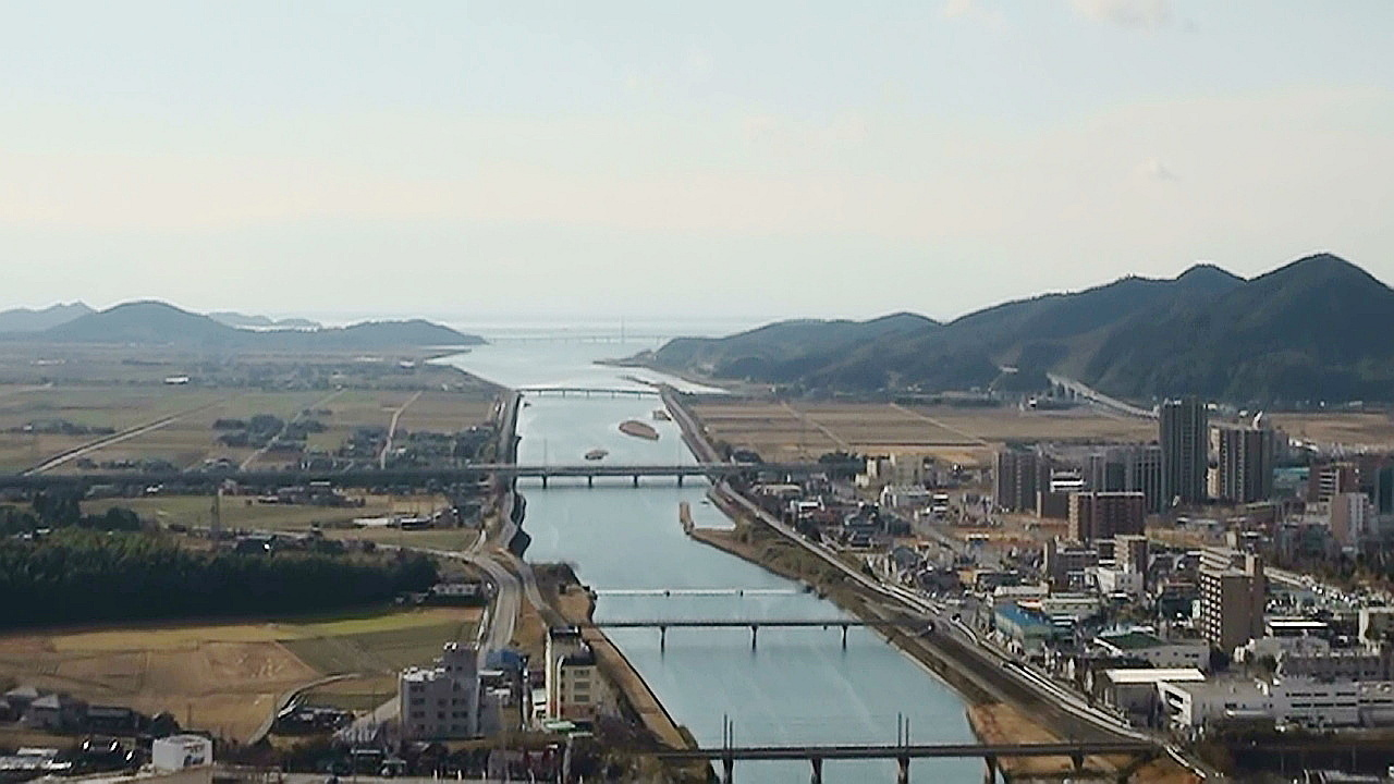 2012年1月